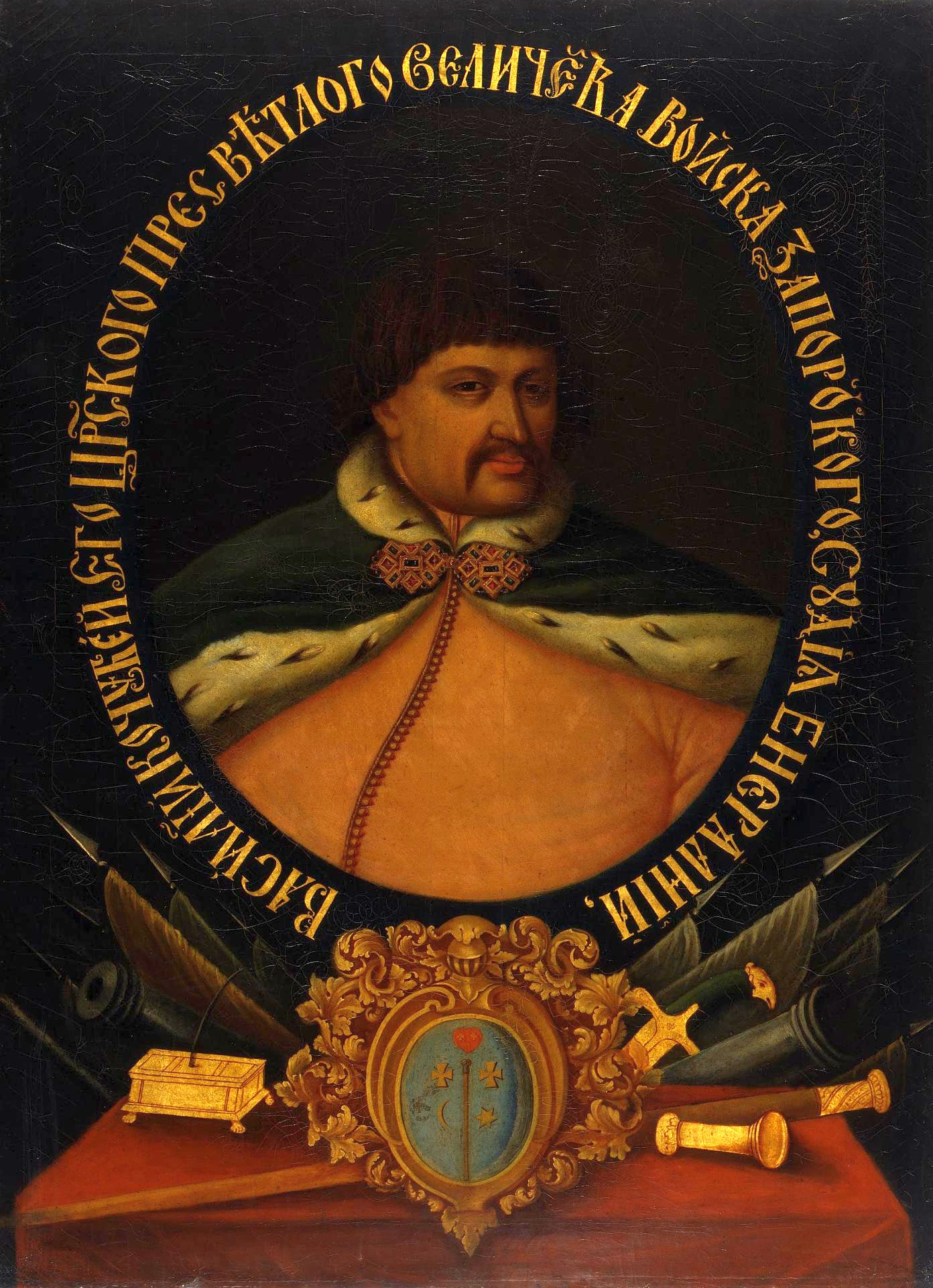 Портрет Василия Леонтьевича Кочубея